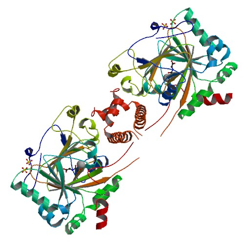 HIF1A